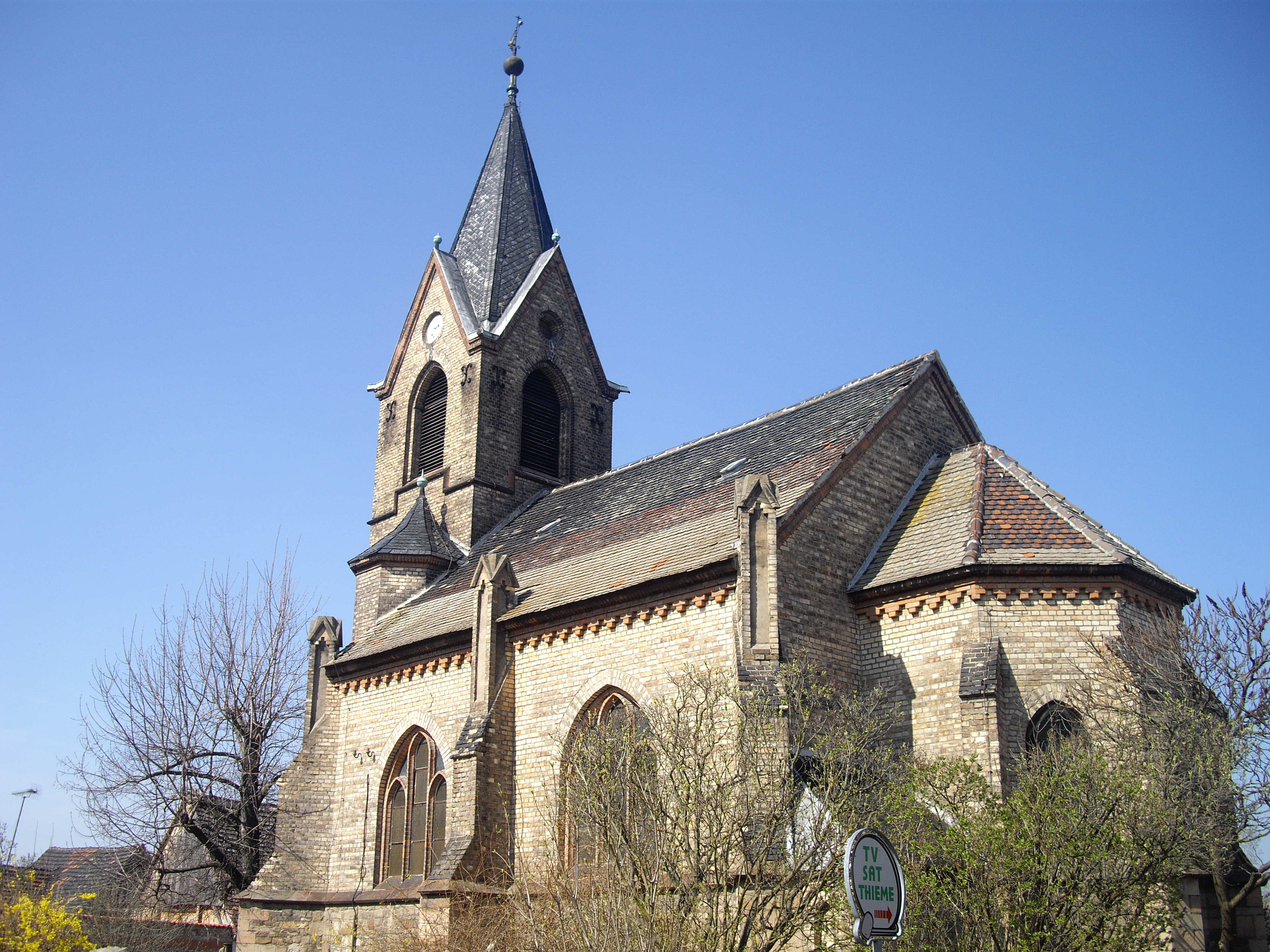 Die Dorfkirche St. Bartholomäus in Aseleben, Landkreis Mansfeld-Südharz